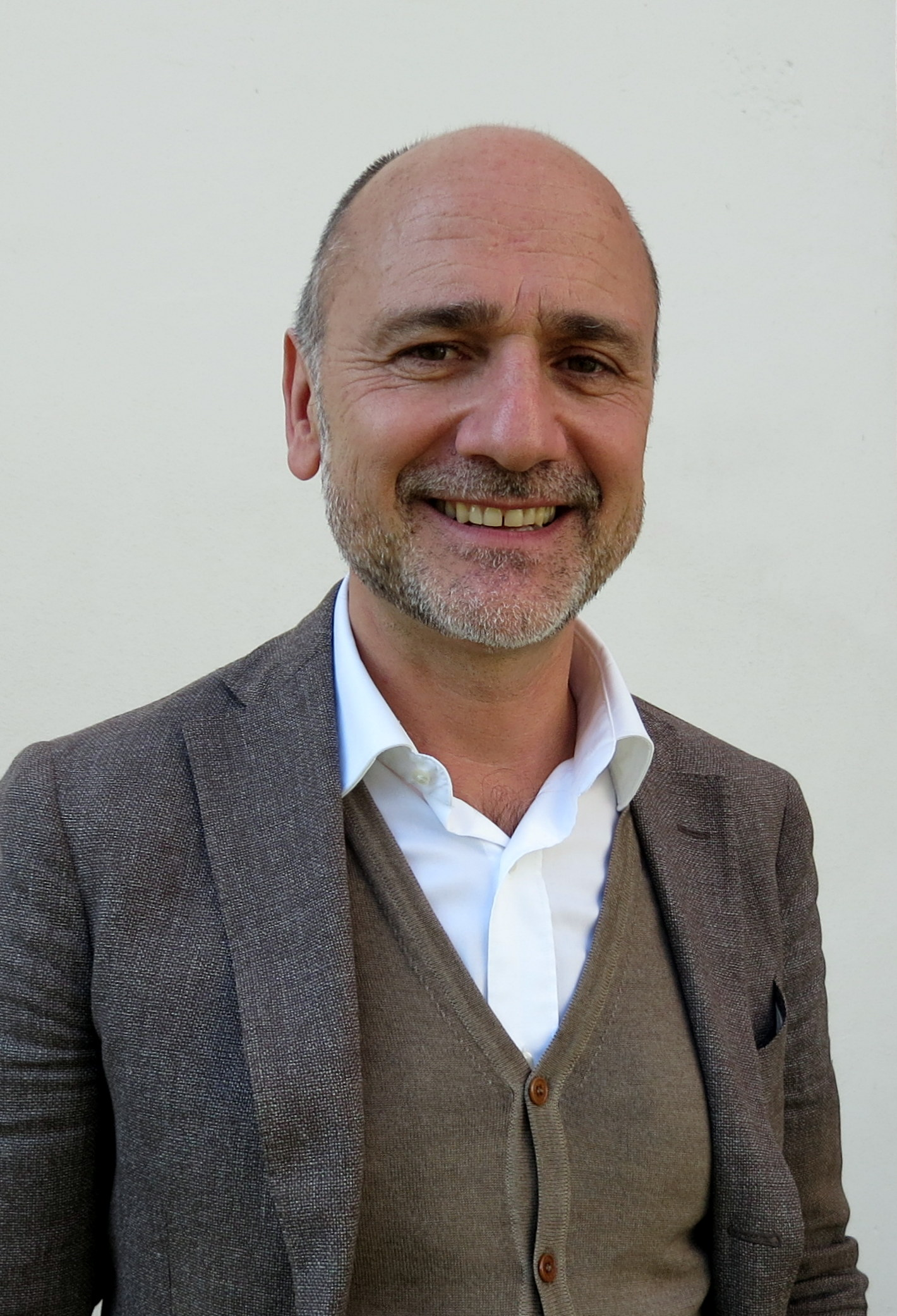 Der promovierte Theologe und Volkskundler ist seit 2012 Direktor des Diözesanmuseums Freising